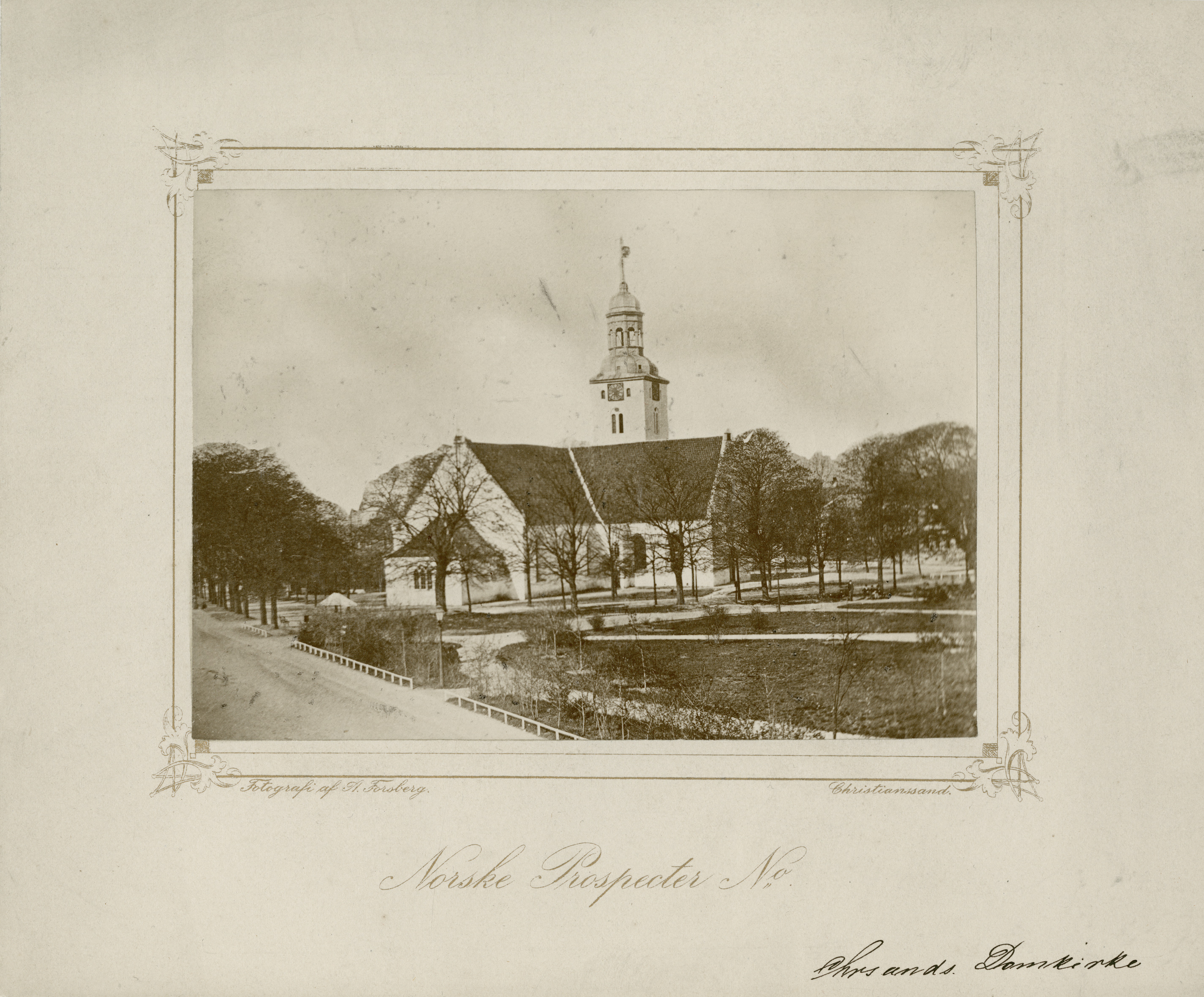 Kristiansand domkirke i Kristiansand, Vest-Agder Kirken ble revet i 1880